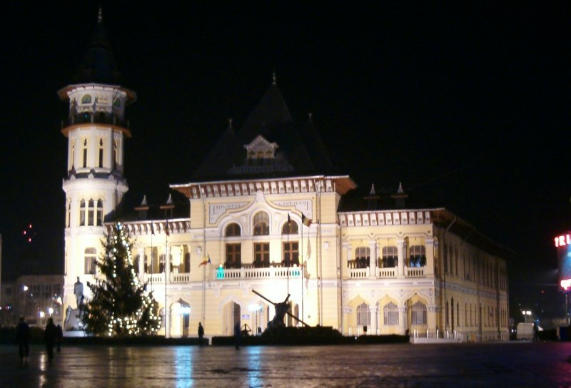 The Communal Palace (Buzău, România city hall)